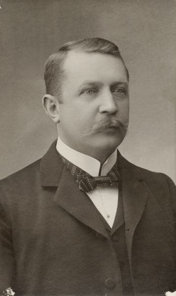 Konsul August Wingårdh (1860–1955).